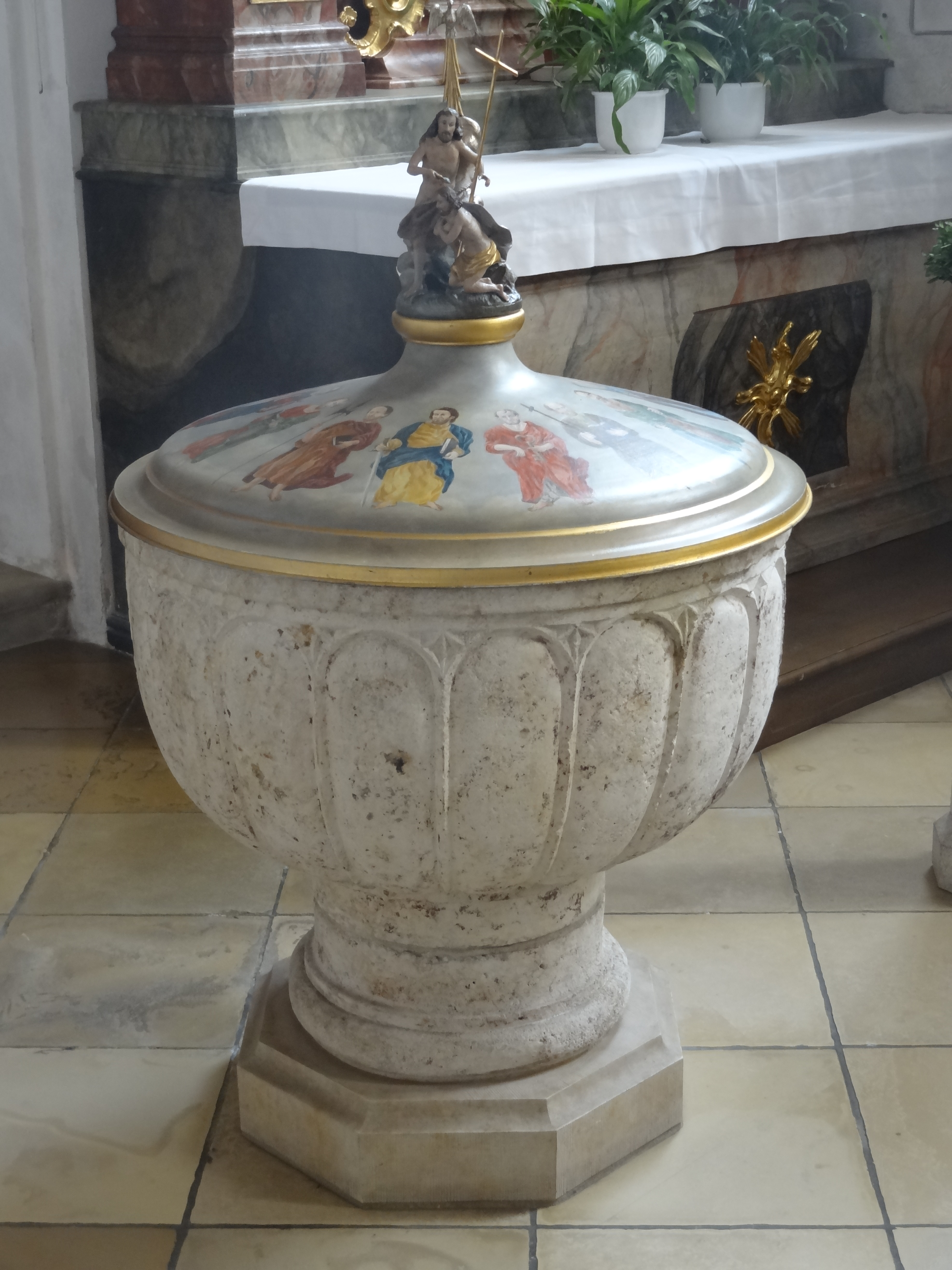 Taufstein der Pfarrkirche Mariä Heimsuchung in Ergolding